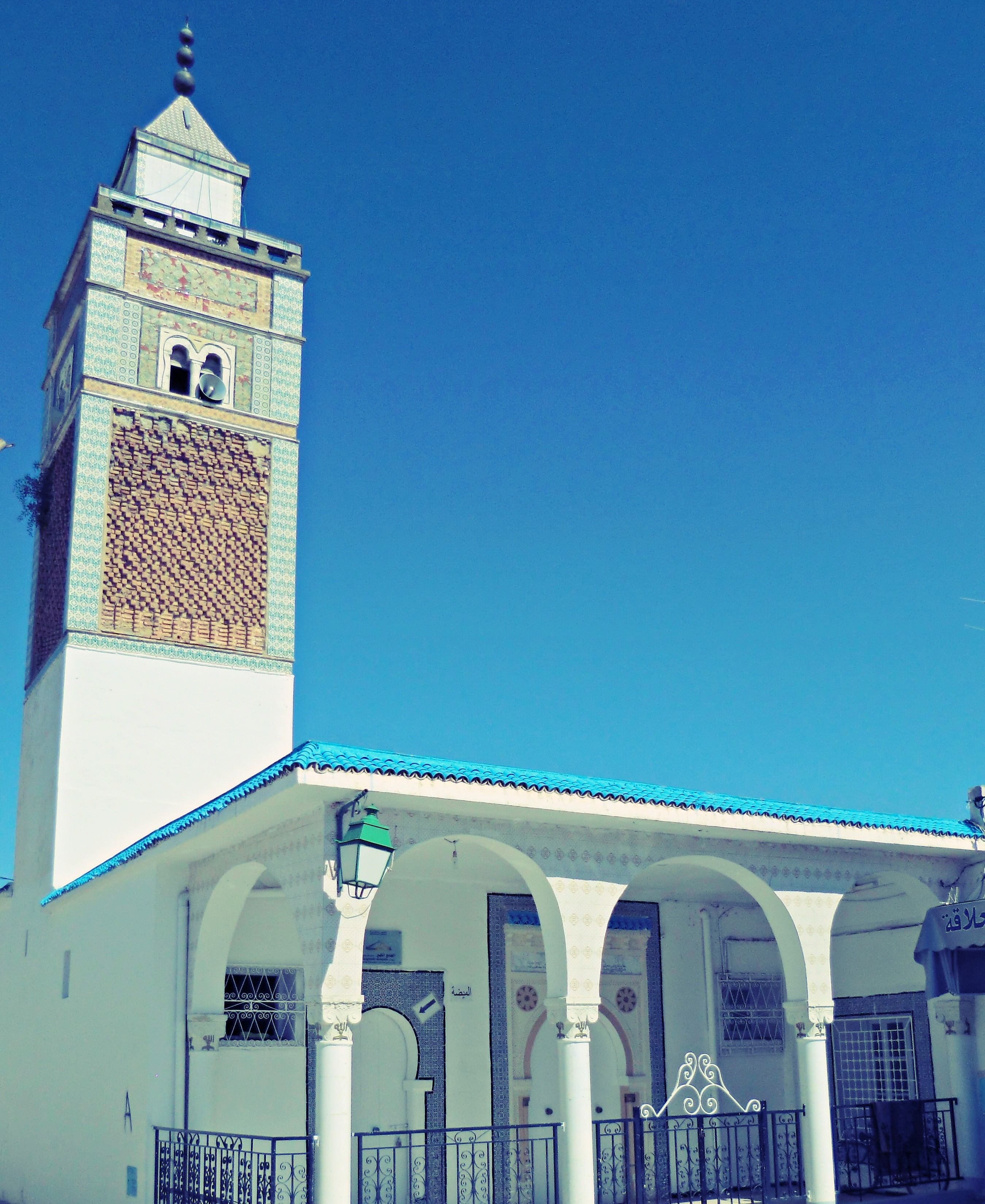 Mosquée, Medjez el-Bab